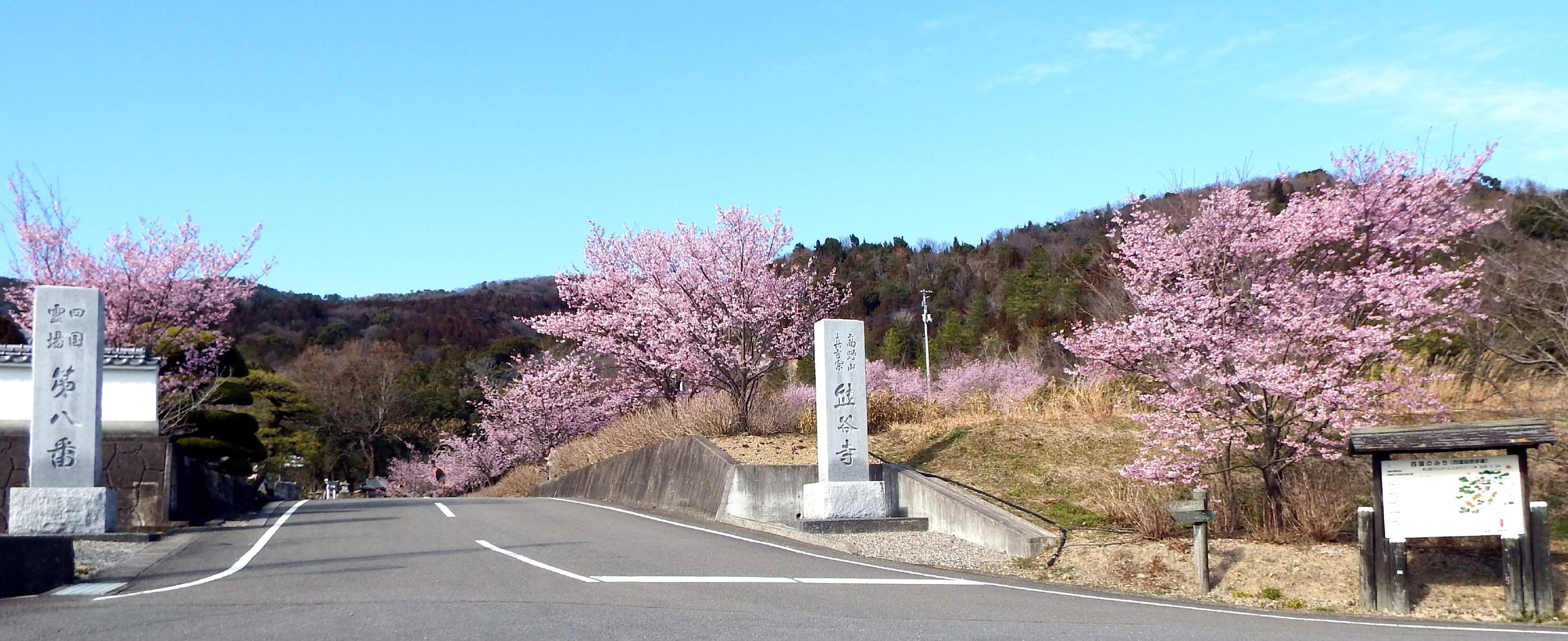 熊谷寺の入口付近